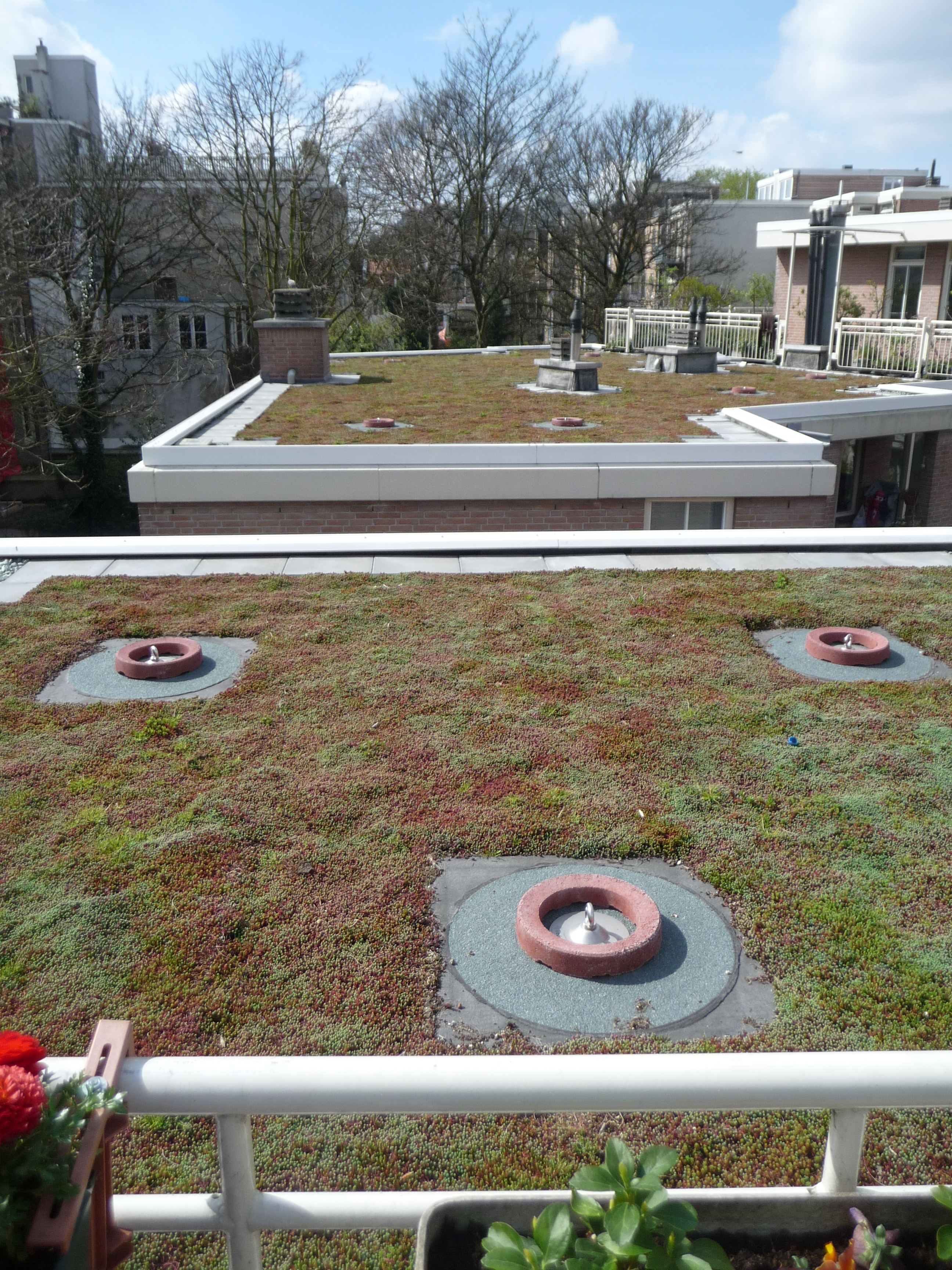 Vegedatiedak op gebouw De Slinger van De Halve Wereld aan het A.S. Onderwijzerhof te Amsterdam, gezicht op het westen